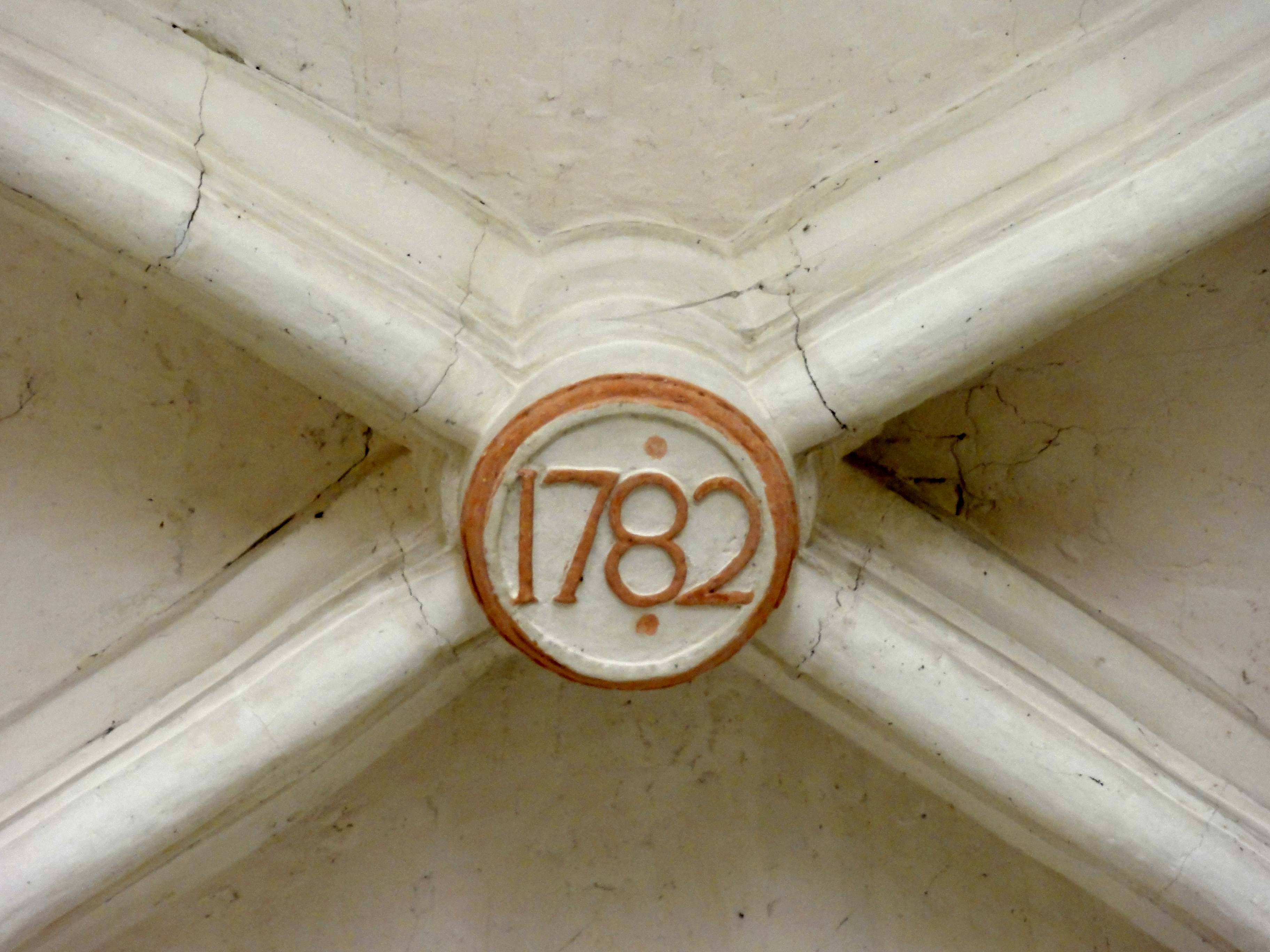 Clé de voûte (voir titre).